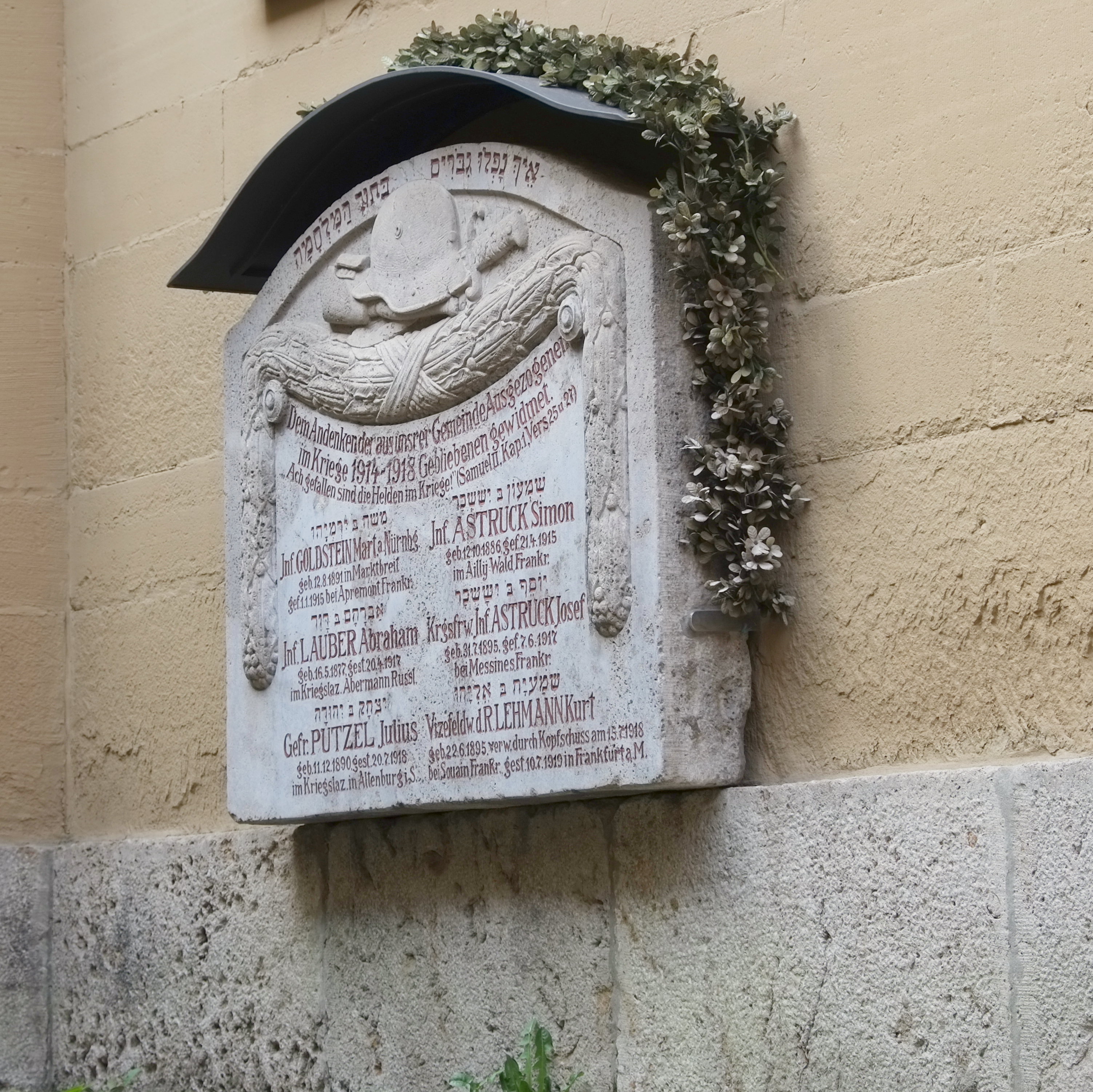 Ehemalige Synagoge in der Pförtleinsgasse 10 in Marktbreit im Landkreis Kitzingen (Bayern, Deutschland)